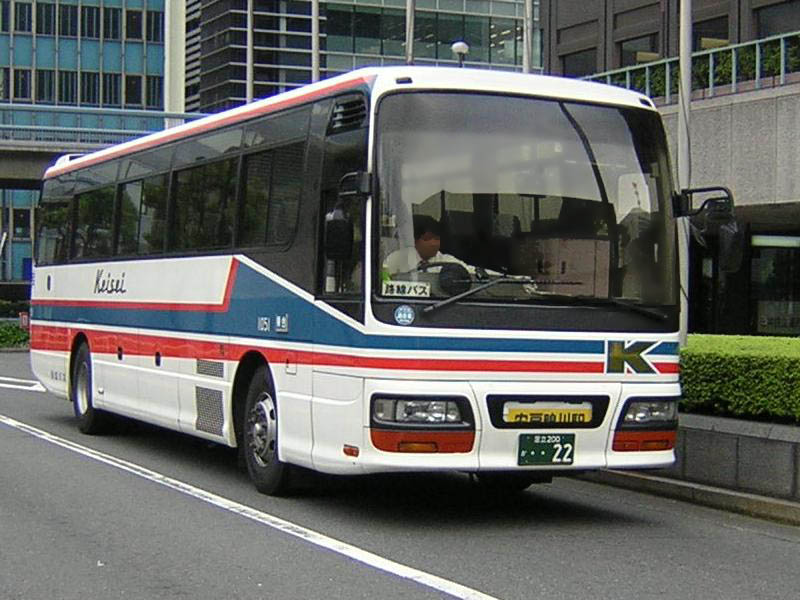 登録番号 足立200か・・22 京成バス奥戸営業所所属 車番1051 高速用車両 （各系統で共通運用） 2005年5月29日 浜松町世界貿易センター附近にて撮影 撮影者 Tokatsu kokubu